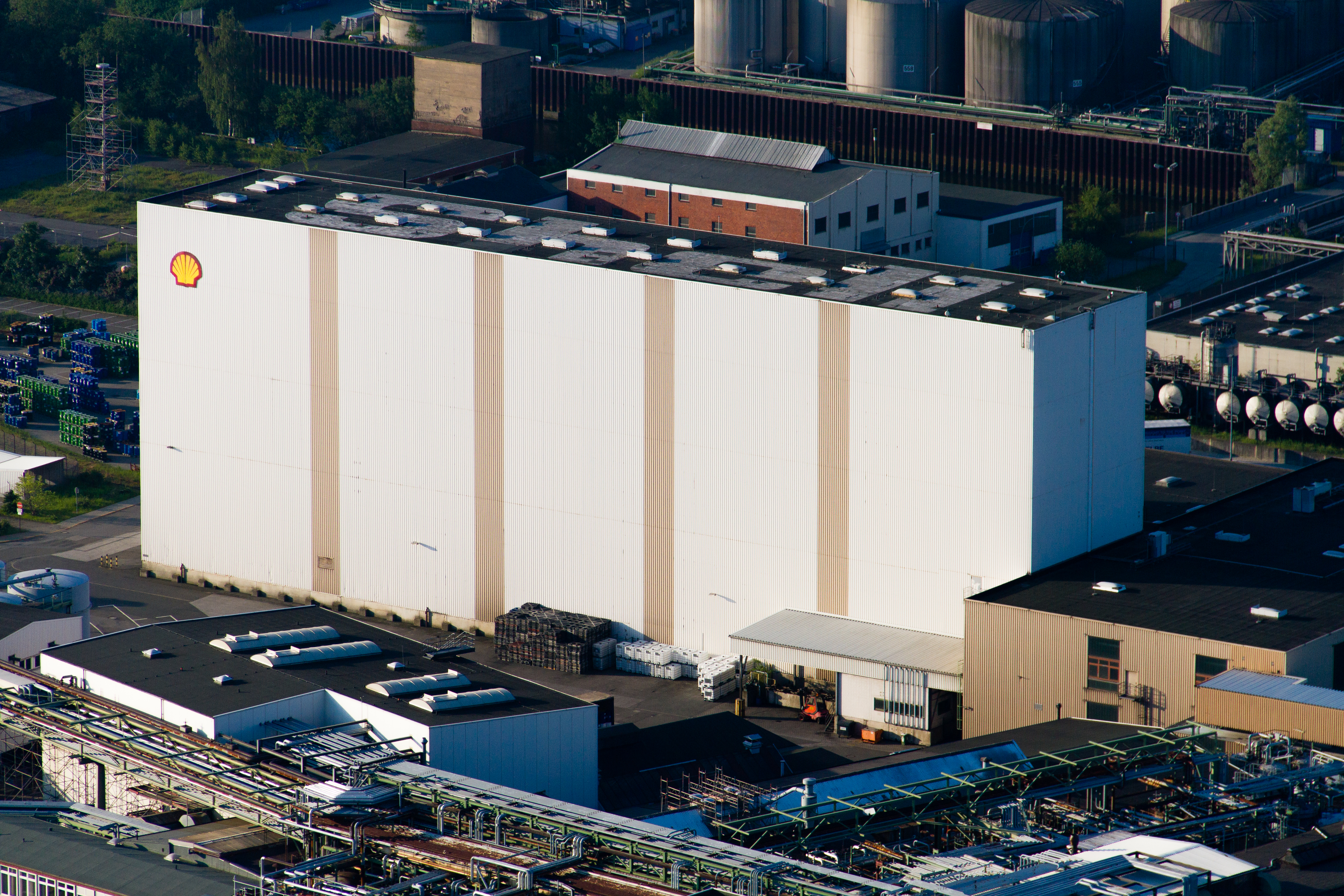 Shell Deutschland Oil GmbH, Worthdamm 32, Hamburg-Steinwerder